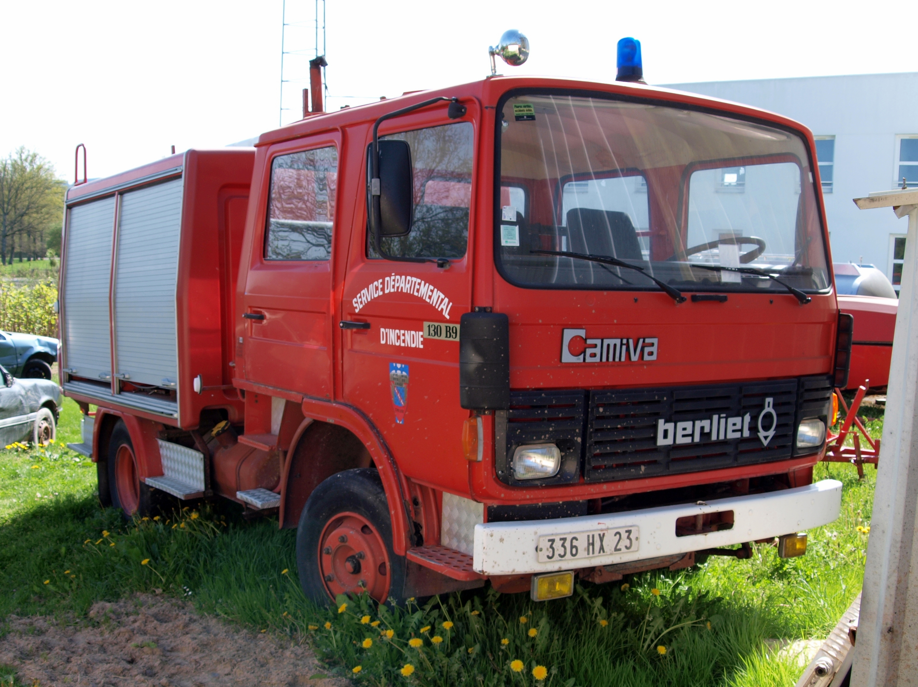 Berliet 130 B9, France, département de la Creuse.